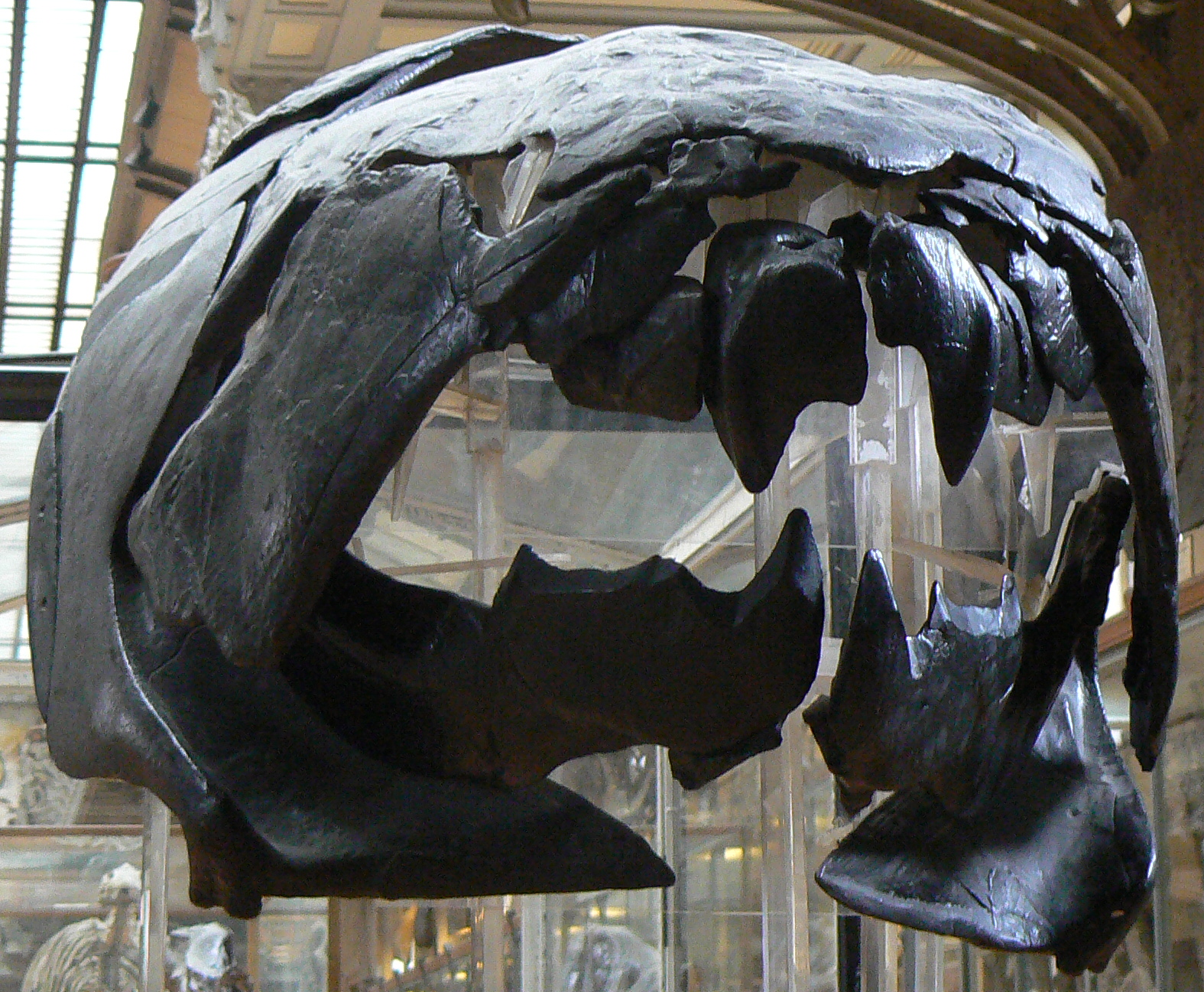 Dunkleosteus